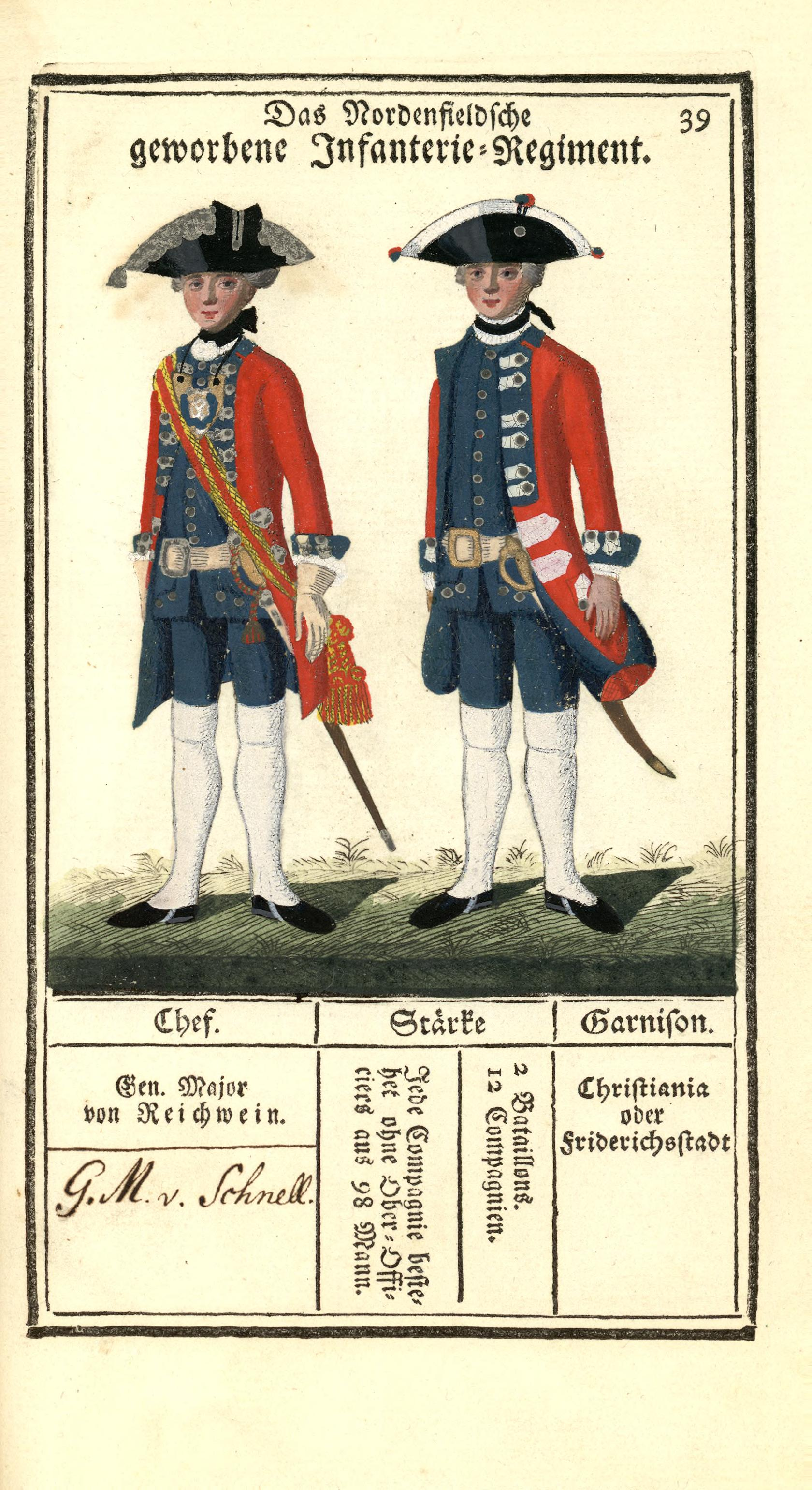 Illustrasjon hentet fra boken "Vorstellung der sämtlichen Königl. Dänischen Armee" av Bertram, Carl og utgitt av Carl Bertram (dk, 1763)